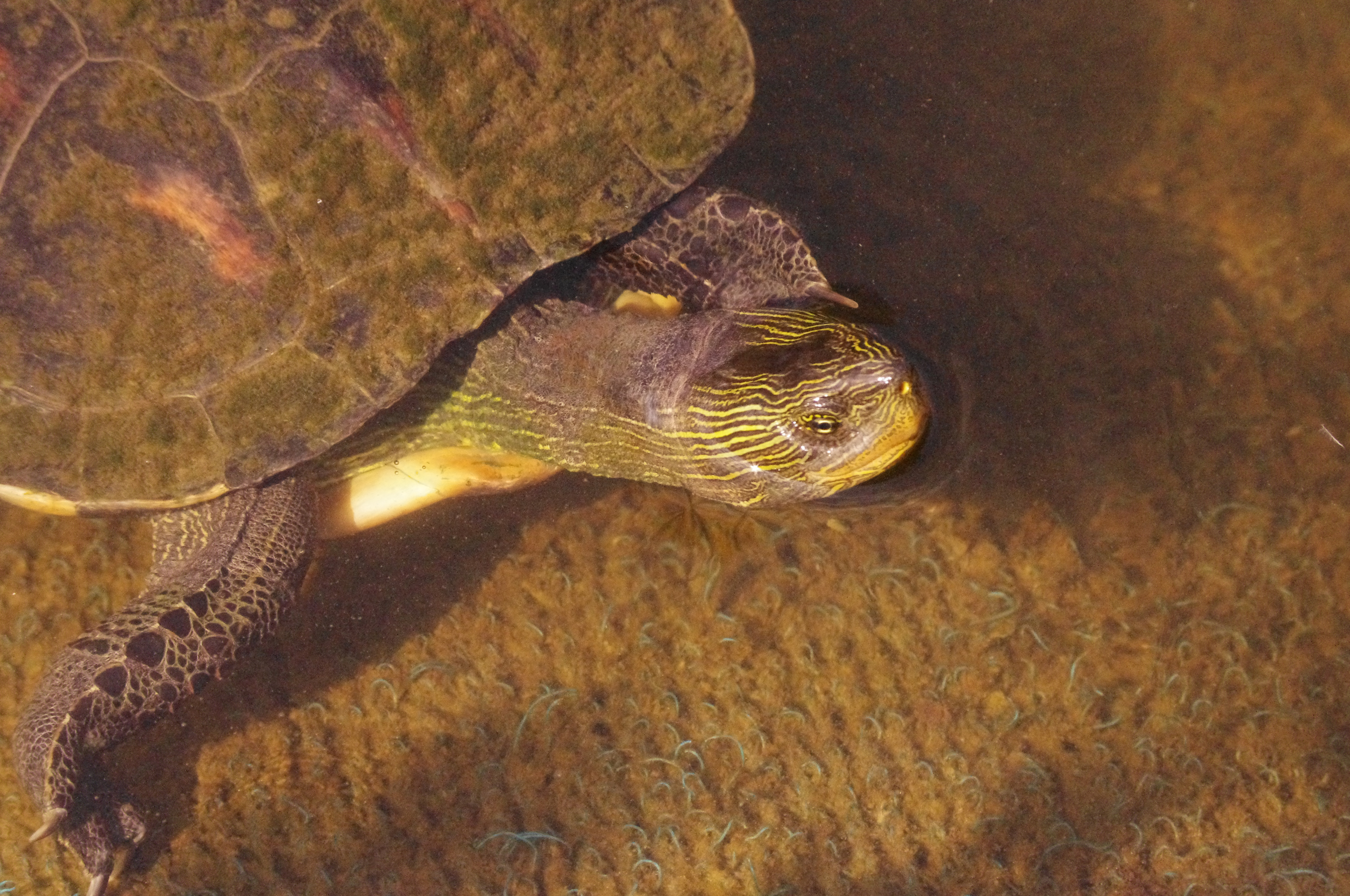 中文（台灣）: 野生台灣斑龜，拍攝於台中秋紅谷